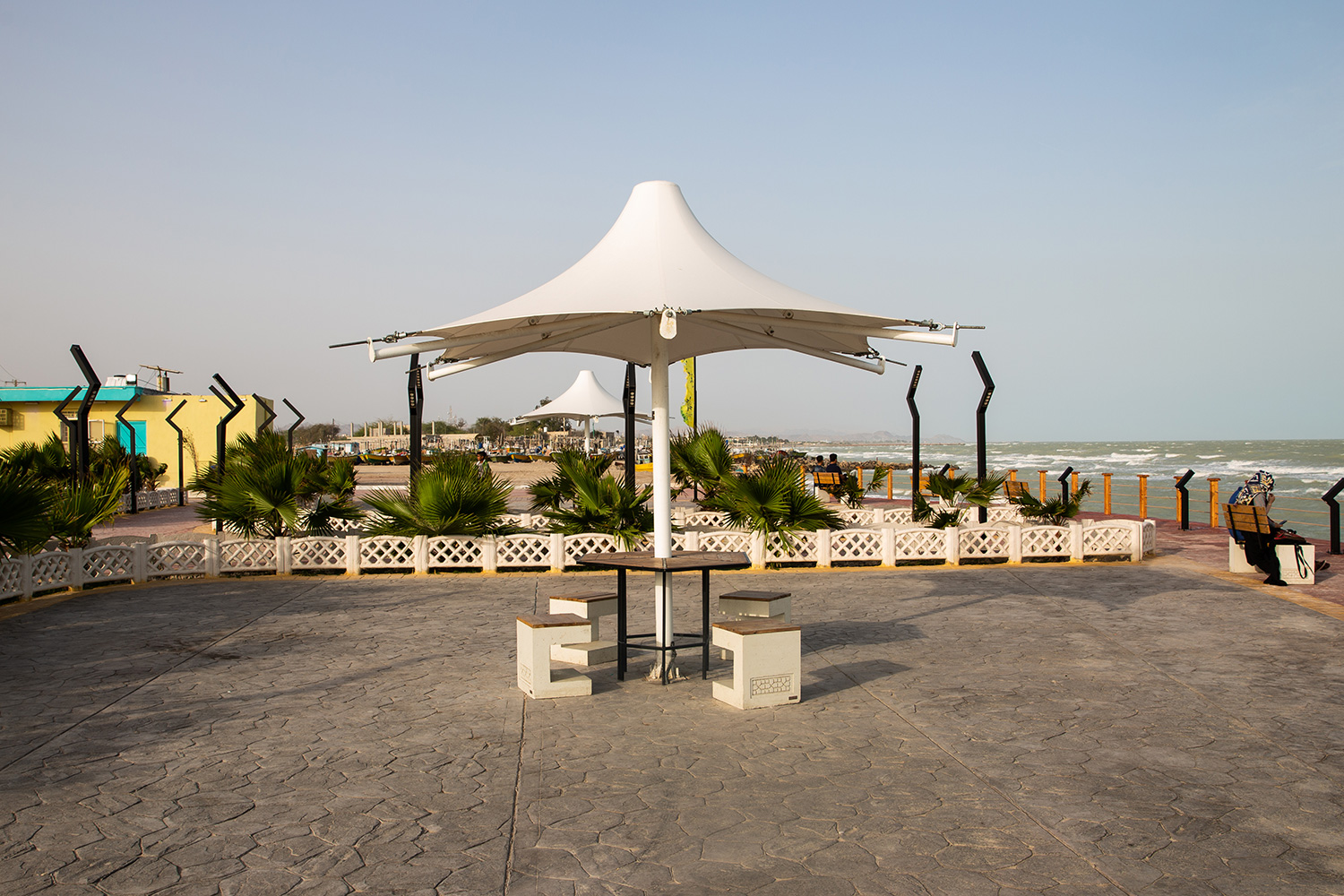 ساحل بندرلنگه